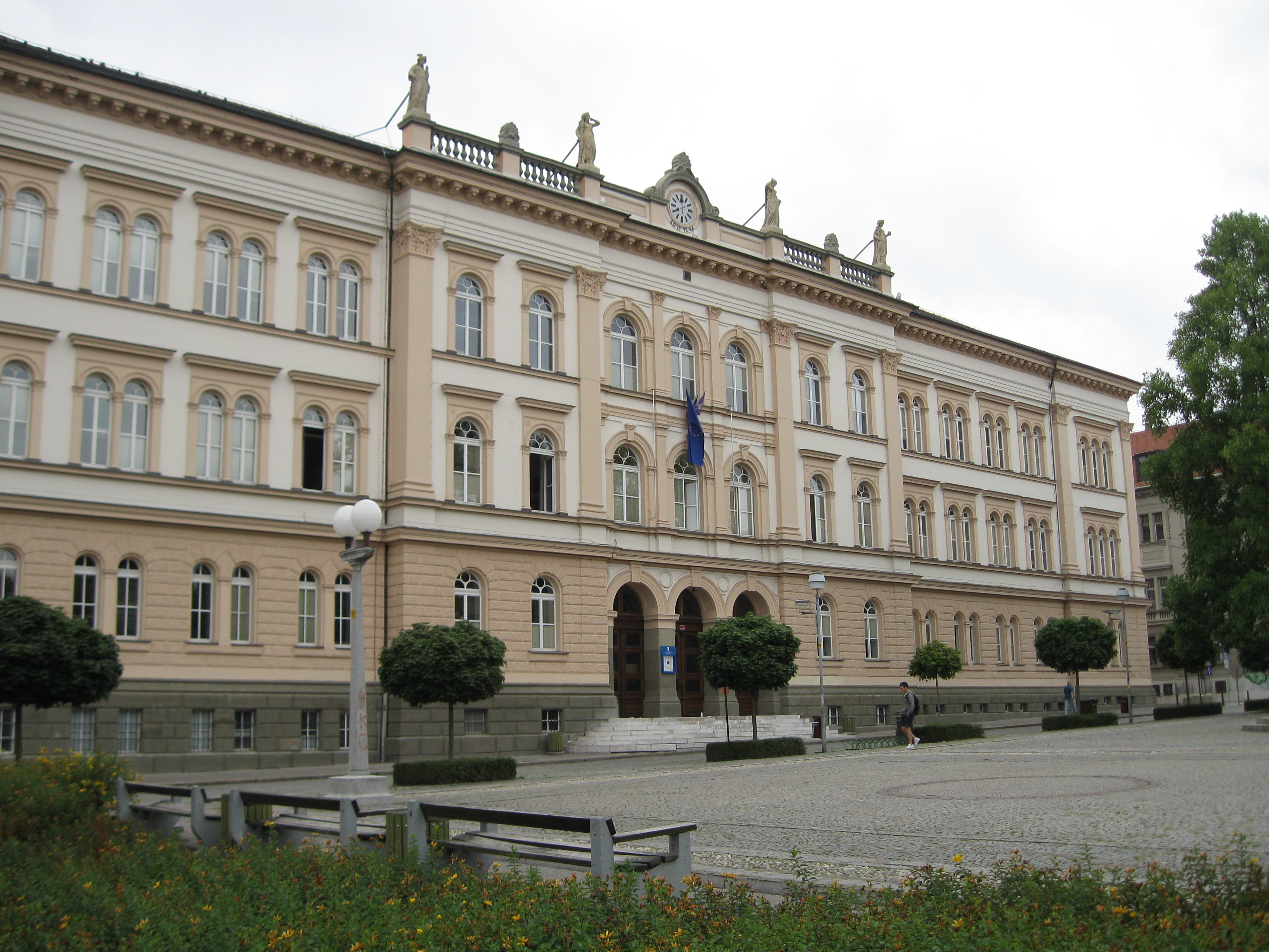 Prva gimnazija v Mariboru.